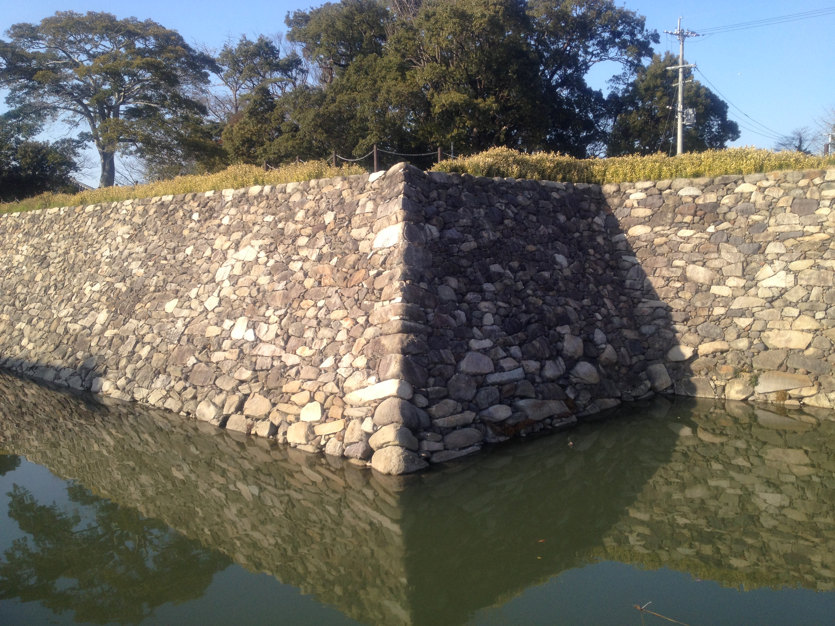 豊後国中津城本丸の復元された南側内堀と石垣。そのうち櫓台のあった出隅部分。